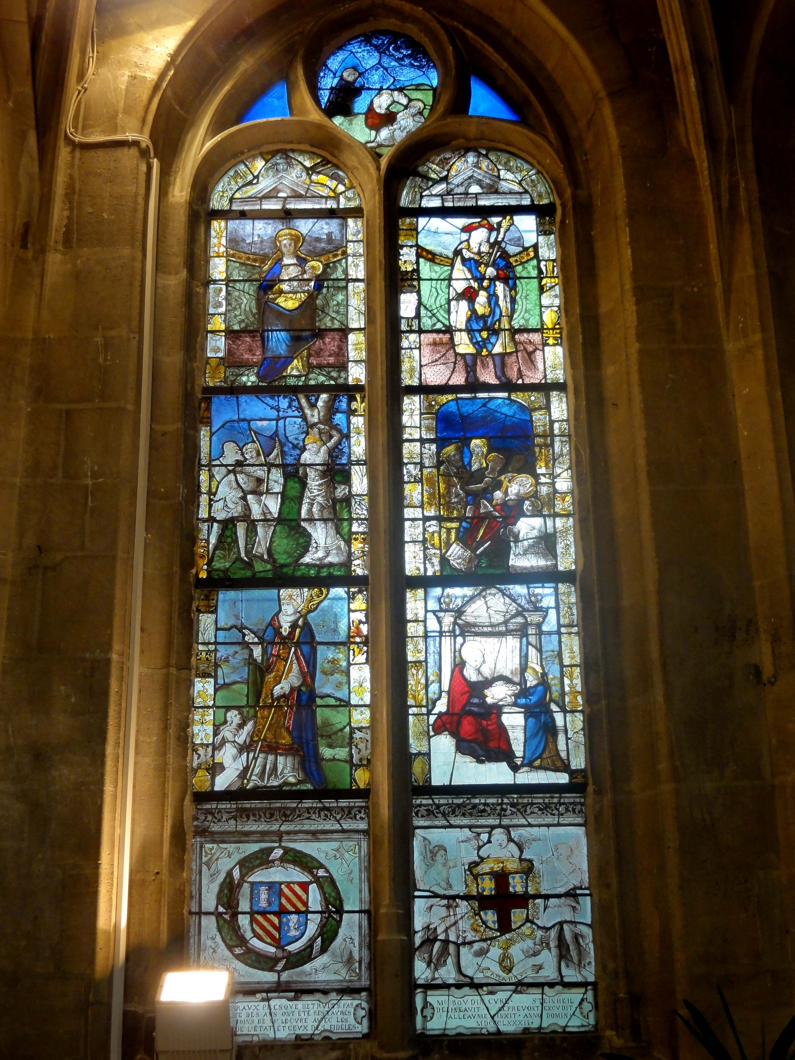 Verrière n° 3.